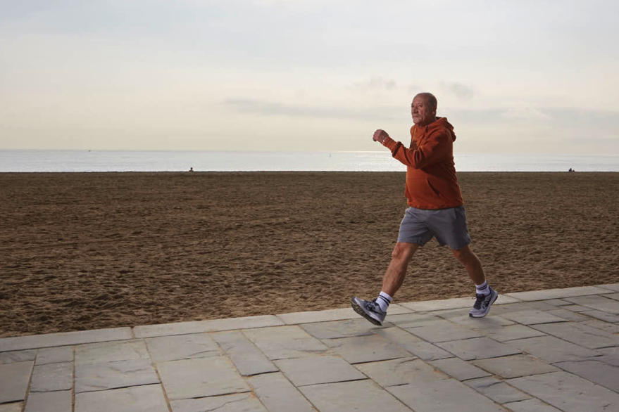 Agustí Jorba practicando marcha atlética en la playa de la Barceloneta para una campaña de Oi2